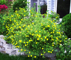 offert par une jardinière amateur